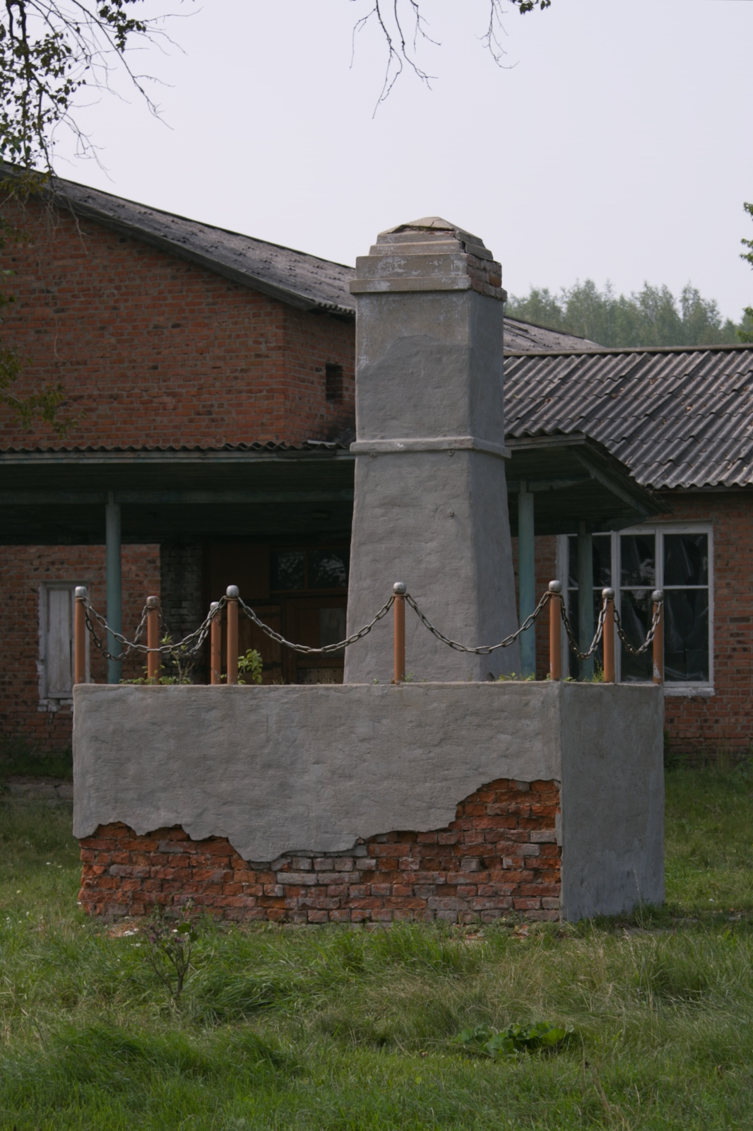 Обелиск революционеру-демократу А. Н. Радищеву. Омская область, Нижнеомский район, деревня Радищево.